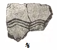 Hjalmar Appelgrenin piirros Kauttuan linnavuorelta löydetystä saviastian palasta